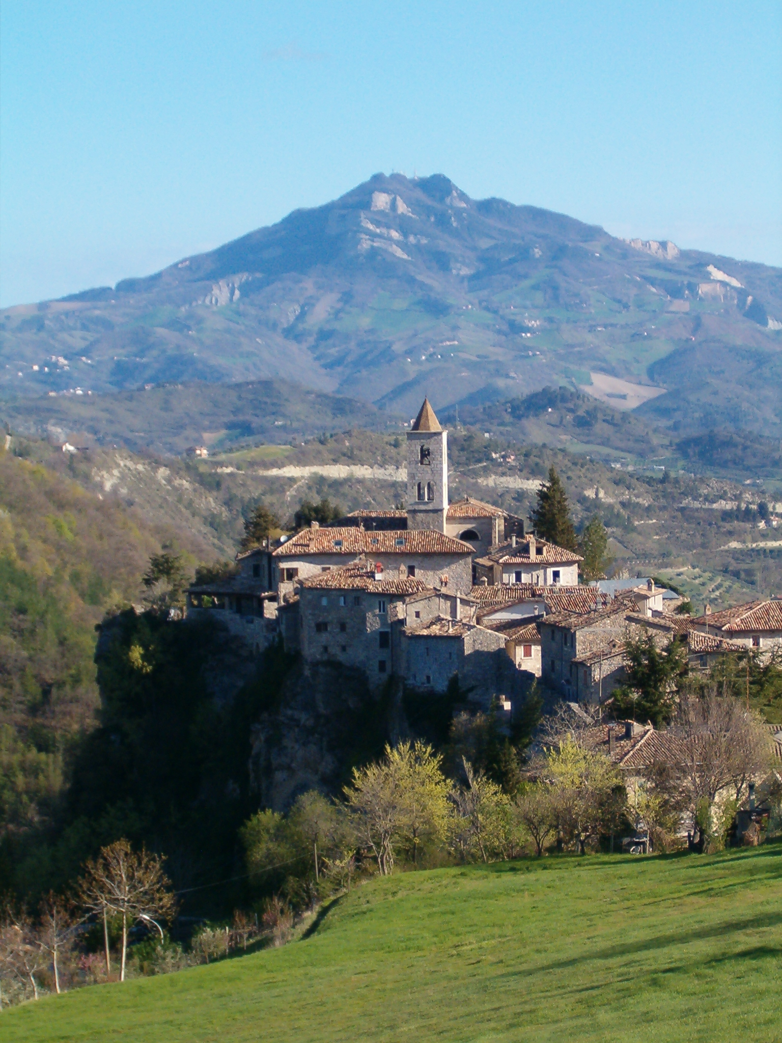 Mauro Orsini,Castel Trosino